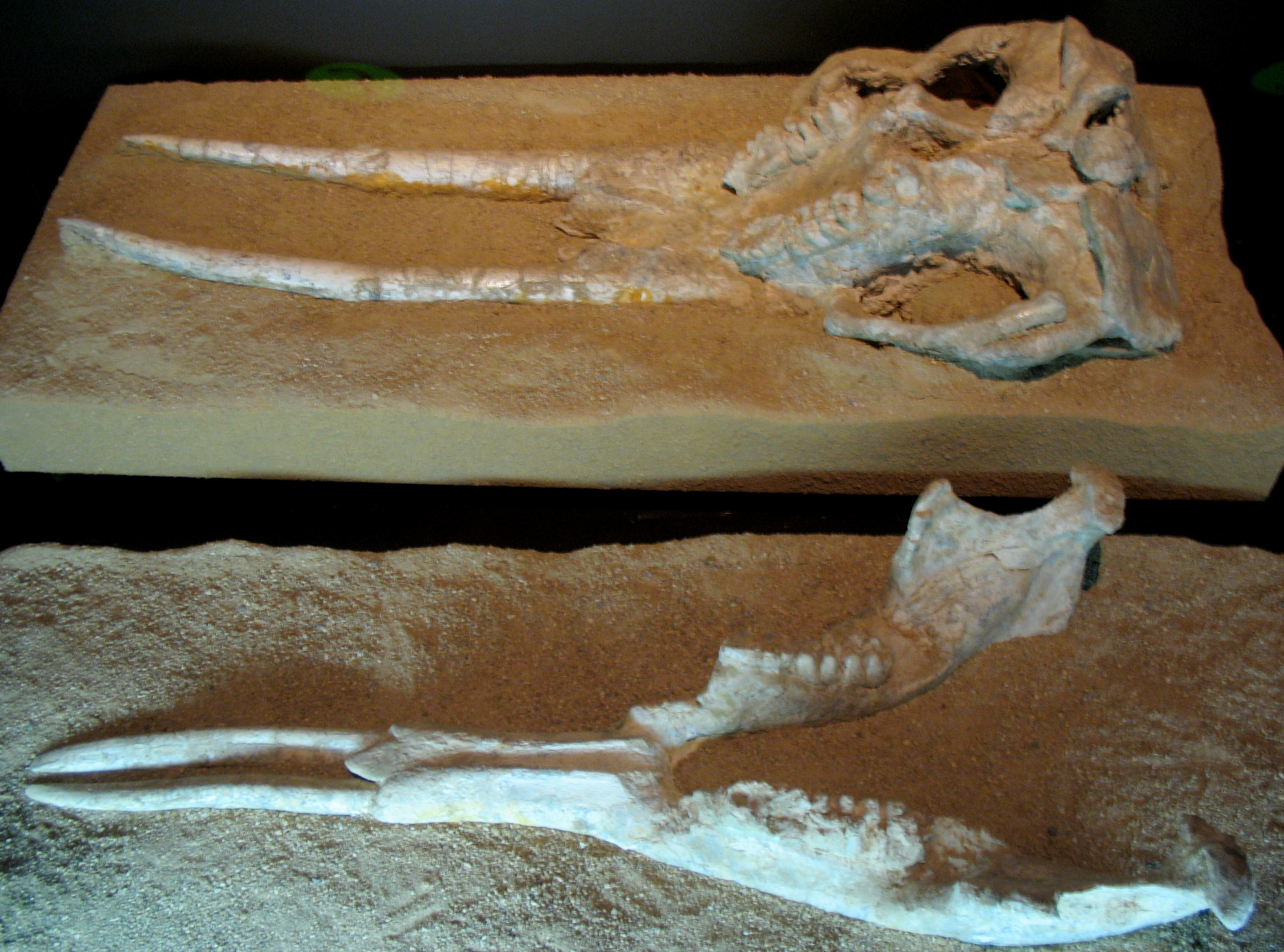 Cráneo y mandíbula de Tetralophodon longirostris - Yacimiento Batallones 2 (Cerro de los Batallones, Torrejón de Velasco, Madrid, España), del Vallesiense (Mioceno superior). Ejemplar en el Museo Arqueológico Regional de la Comunidad de Madrid (Alcalá de Henares). Véase el trabajo de restauración de estos ejemplares en: Gutierrez del Solar Bragado, P. y Gómez Alonso Ruiz, B. (2015) "La restauración de fósiles". Museo Nacional de Ciencias Naturales, NaturalMente, 7: 42-45